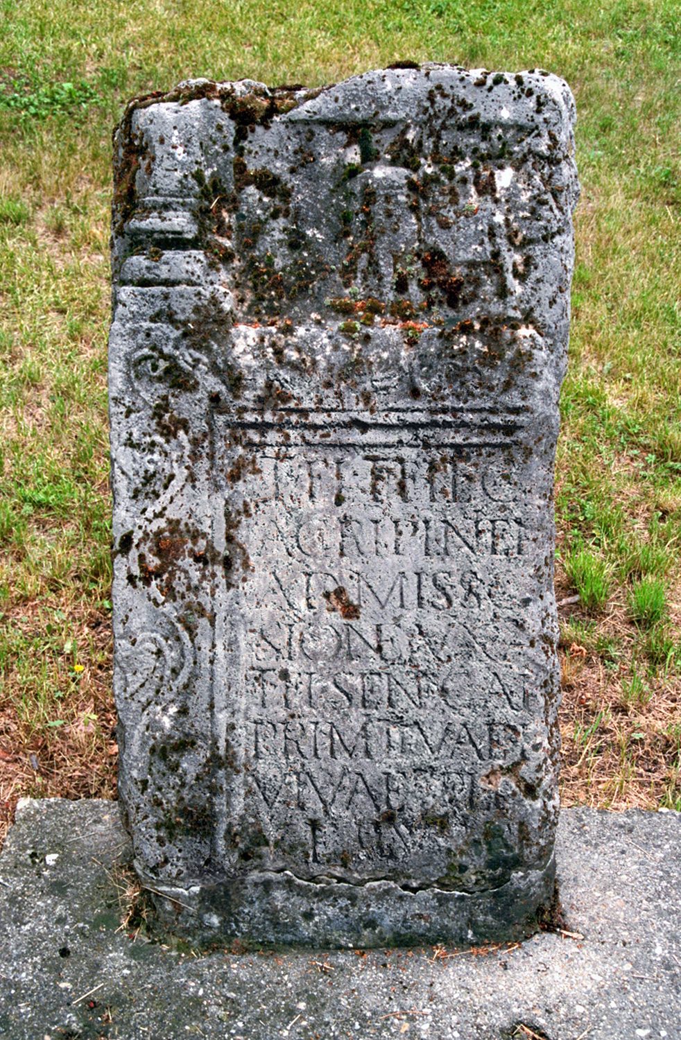 Fundort: Pomáz. Verwahrort: Szentendre (Ungarn): Grabstele des Legionsreiters Titus Flavius, auf der über der Inschrift sein Reitknecht mit seinem Pferd abgebildet ist. Entstanden zwischen 100 bis 130 n. Chr. Die Rückseite wurde zwischen 250 und 300 n. Chr. sekundär zu einer Porträtnische umgearbeitet.